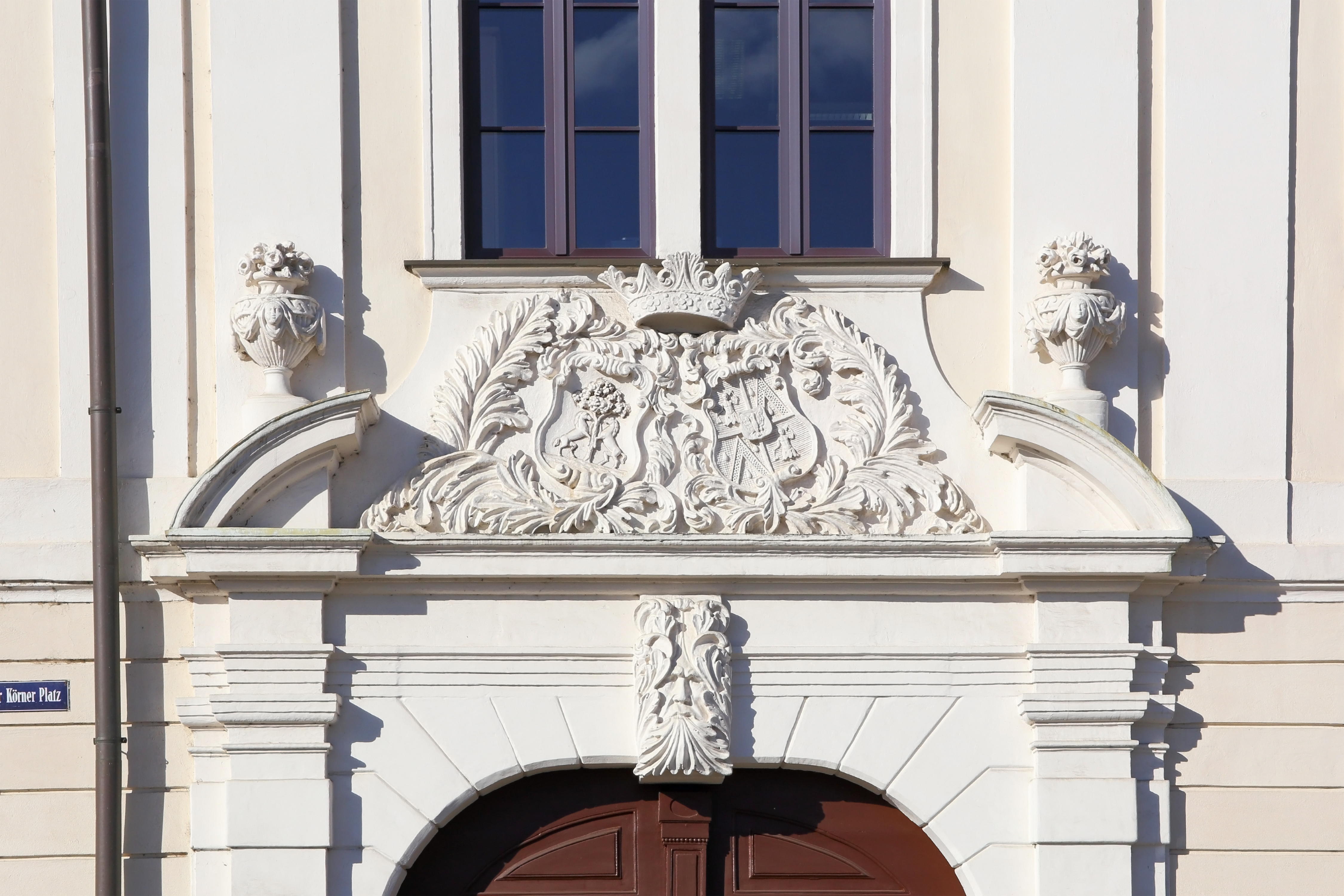 Das Schloss Schrems wurde 1635 erbaut. Nach einem Brand im Jahr 1777 wurde es 1781 neu errichtet. Seit 1951 dient das Schloss als Berufsschule. über den beiden südlichen Seitentoren befinden sich die Wappen der Freiherrn von Bartenstein.